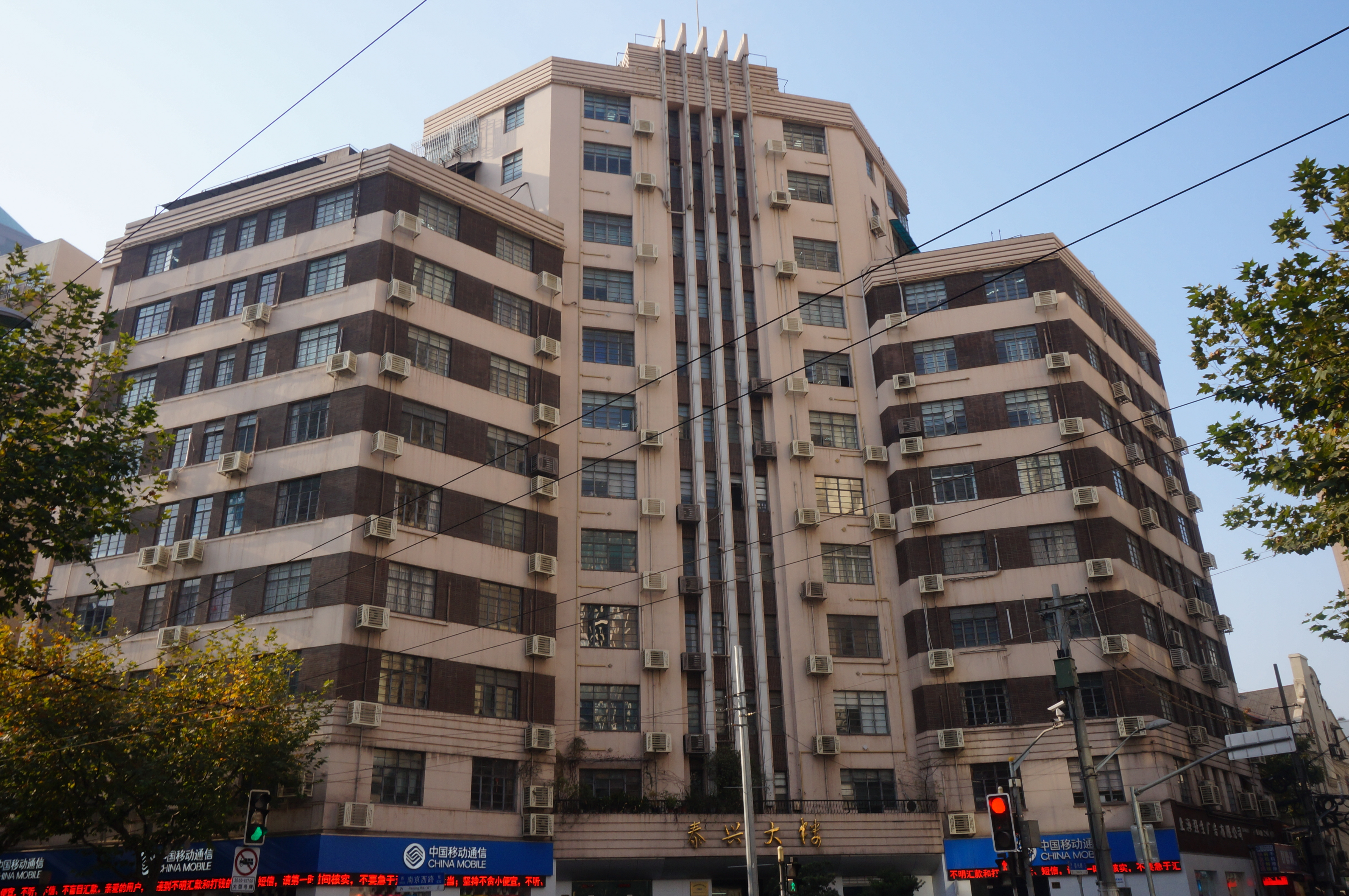 泰兴大楼外表